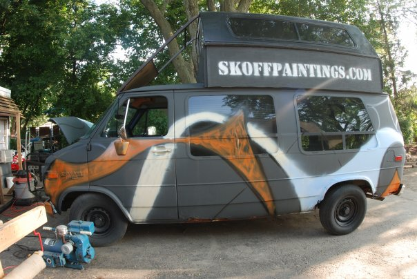 Skoff Van